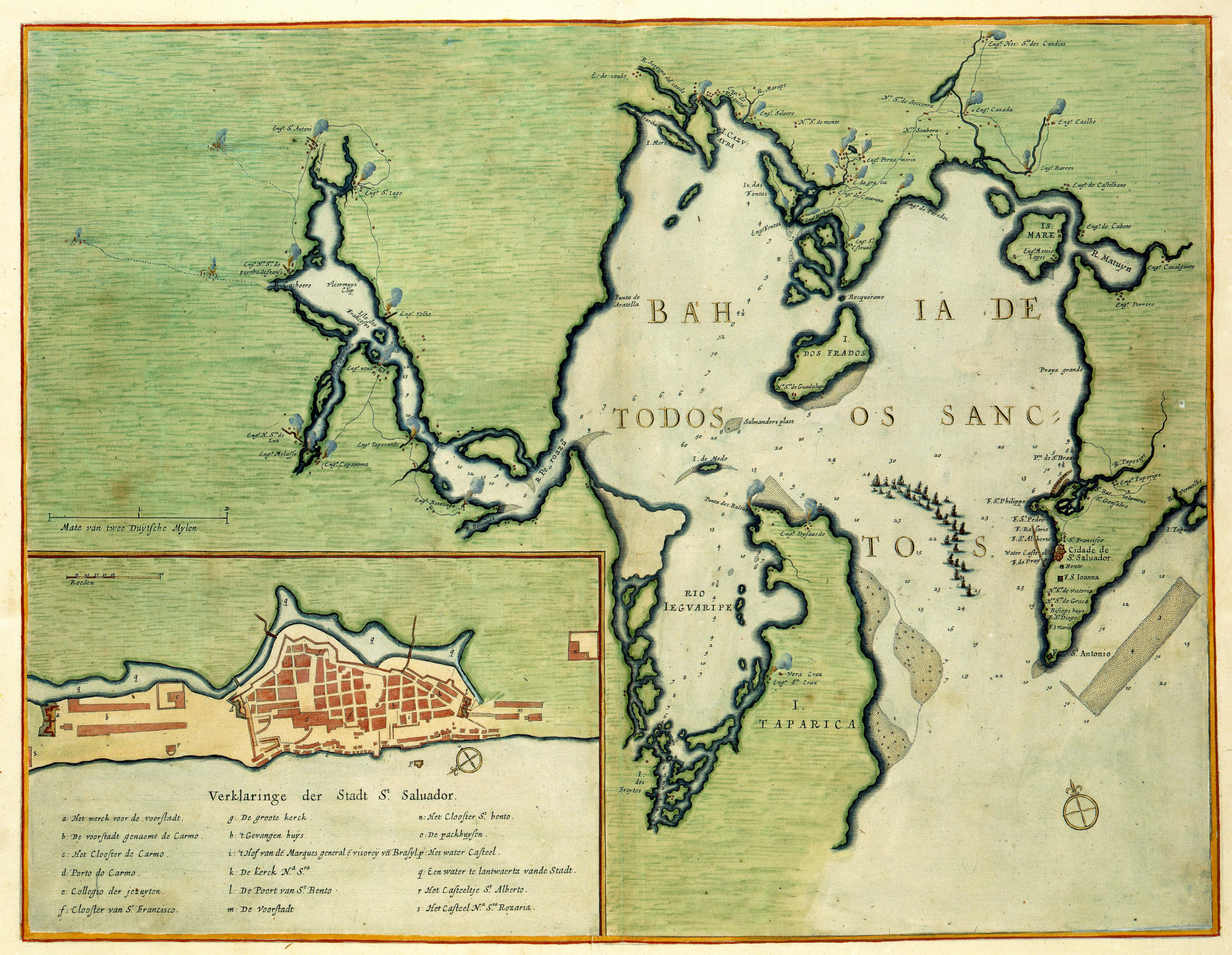 Deel: 4; Linksonder een inzet met een plattegrond van San Salvador. Daaronder een Verklaringe der Stadt St. Saluador